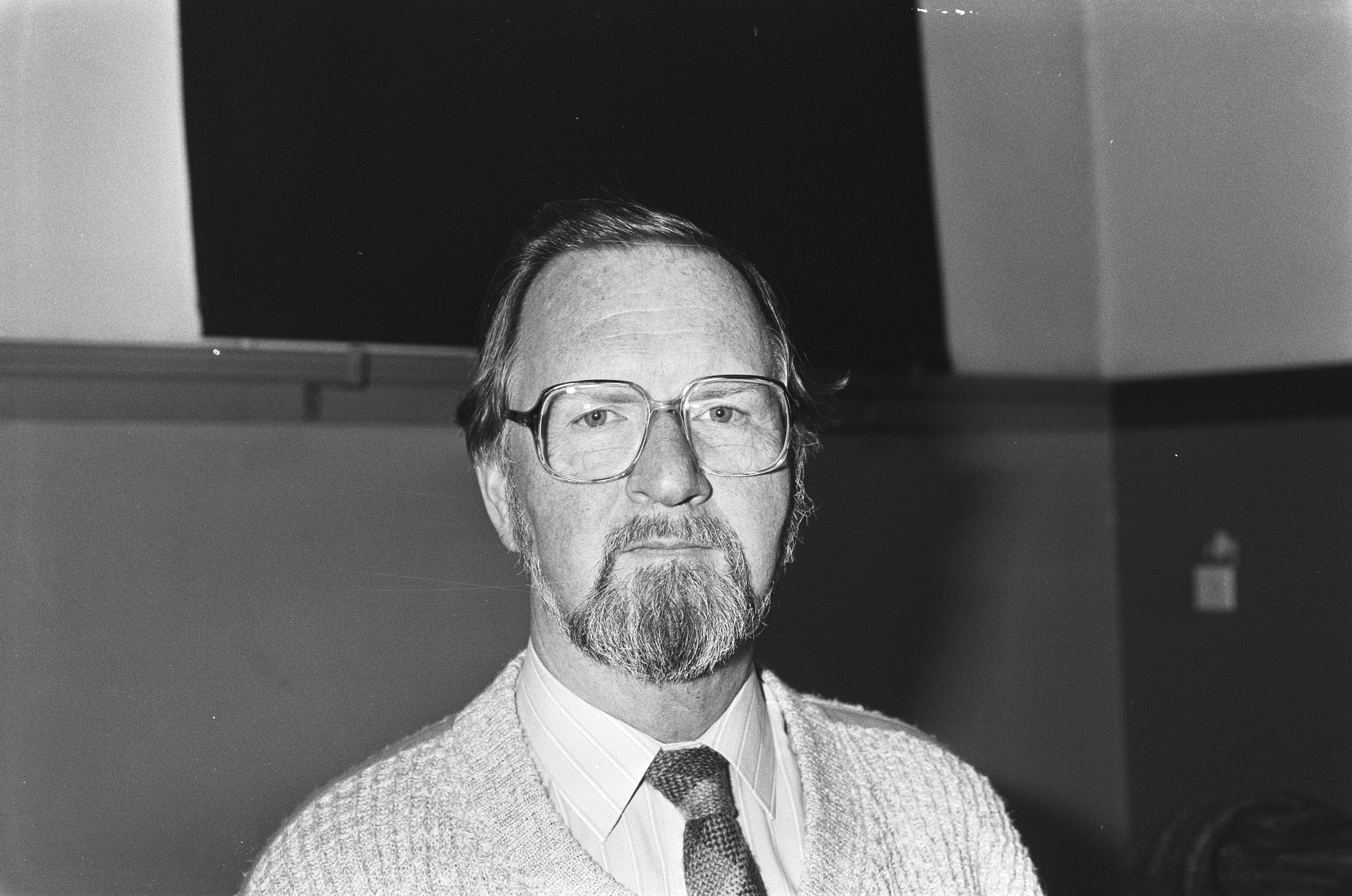 Collectie / Archief : Fotocollectie Anefo Reportage / Serie : Het Nederlandse Studentenorkest tijdens de eerste repetitie met hun nieuwe dirigent Anton Kersjes Beschrijving : Portret van dirigent Anton Kersjes Datum : 6 januari 1986 Trefwoorden : dirigenten, portretten Persoonsnaam : Kersjes, Anton Fotograaf : Gerrits, Roland / Anefo, [onbekend] Auteursrechthebbende : Nationaal Archief Materiaalsoort : Negatief (zwart/wit) Nummer archiefinventaris : bekijk toegang 2.24.01.05 Bestanddeelnummer : 933-5257